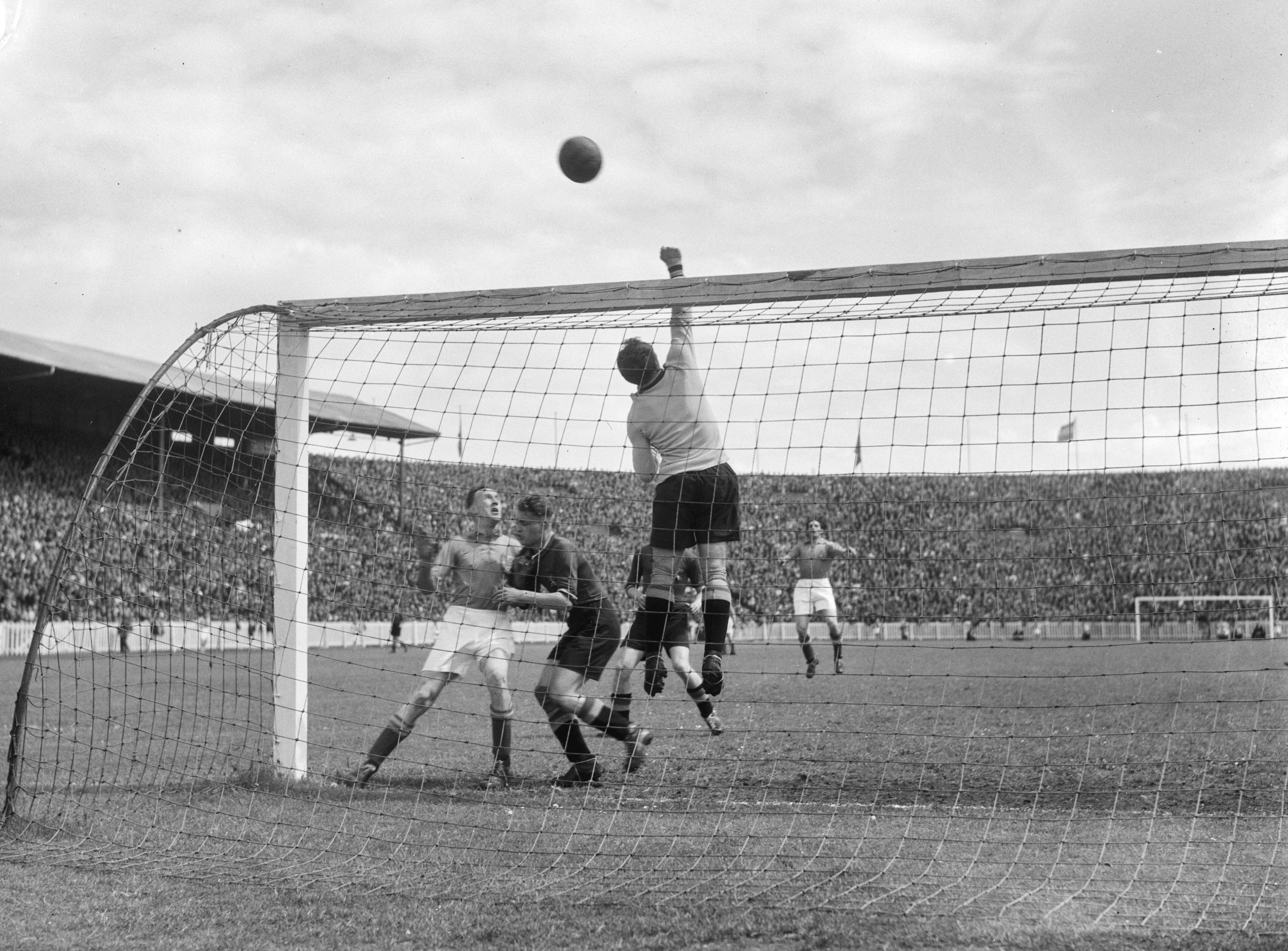 Collectie / Archief : Fotocollectie Anefo Reportage / Serie : [ onbekend ] Beschrijving : Belgie-Holland 2-2. Belgisch doel wordt belaagd Datum : 30 mei 1946 Trefwoorden : internlands, sport, voetbal Fotograaf : Raucamp, Koos / Anefo Auteursrechthebbende : Nationaal Archief Materiaalsoort : Negatief (zwart/wit) Nummer archiefinventaris : bekijk toegang 2.24.01.04 Bestanddeelnummer : 901-7793